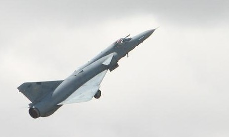 Południowoafrykański samolot Atlas Cheetah E w wersji z zasobnikiem E